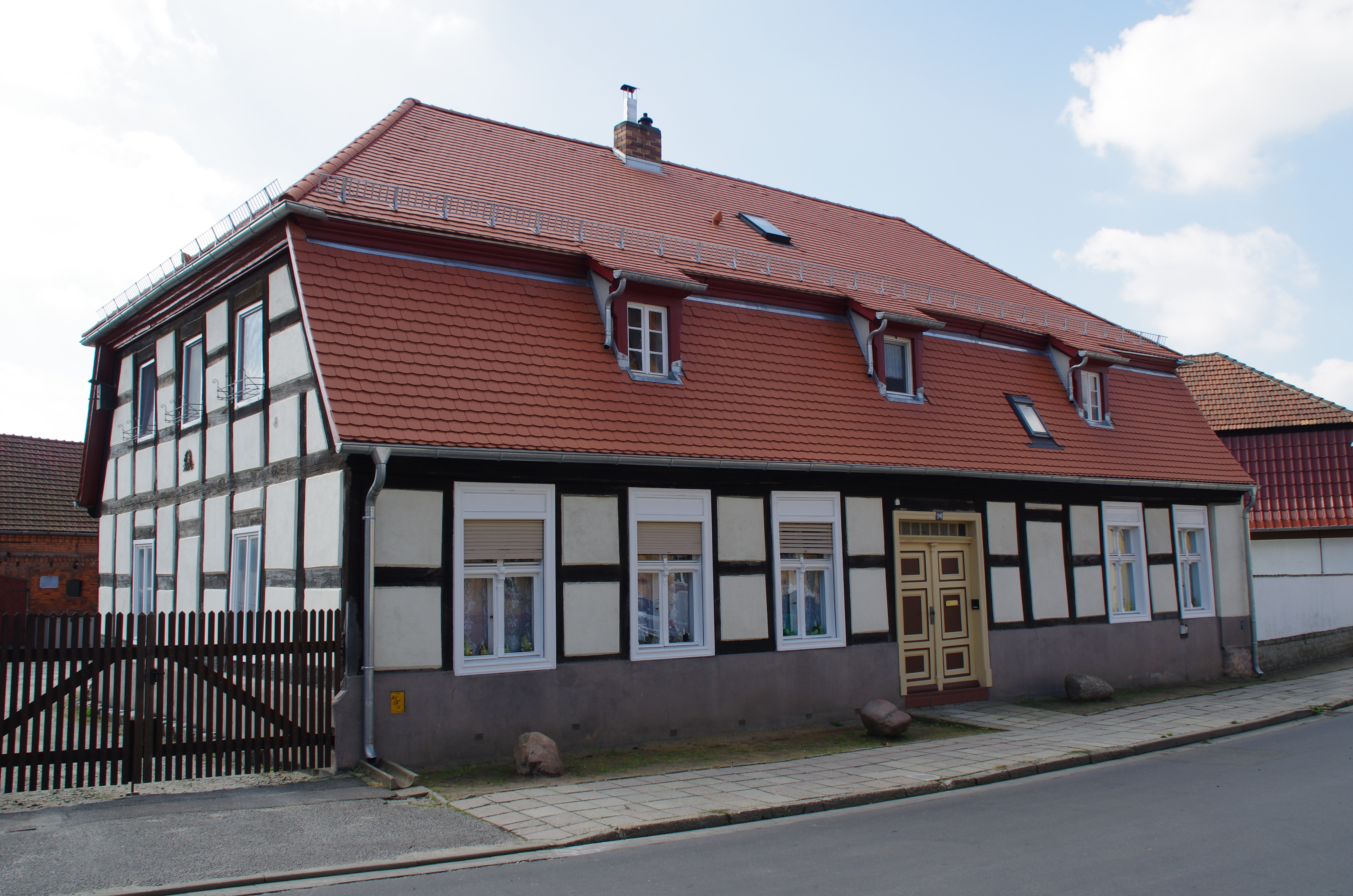 Lübbenau/Spreewald in Brandenburg. Das Haus in der Karl-Marx-Straße 96 steht unter Denkmalschutz.